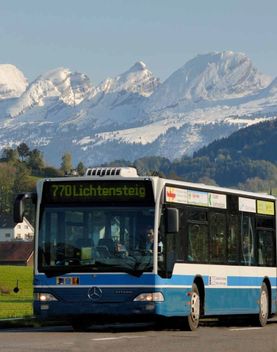 Bus des Busbetriebs Lichtensteig–Wattwil–Ebnat-Kappel (BLWE), im Hintergrund Churfirsten